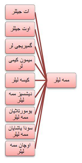 تۆرکجه: ممه لی لرین الت بولوم لری